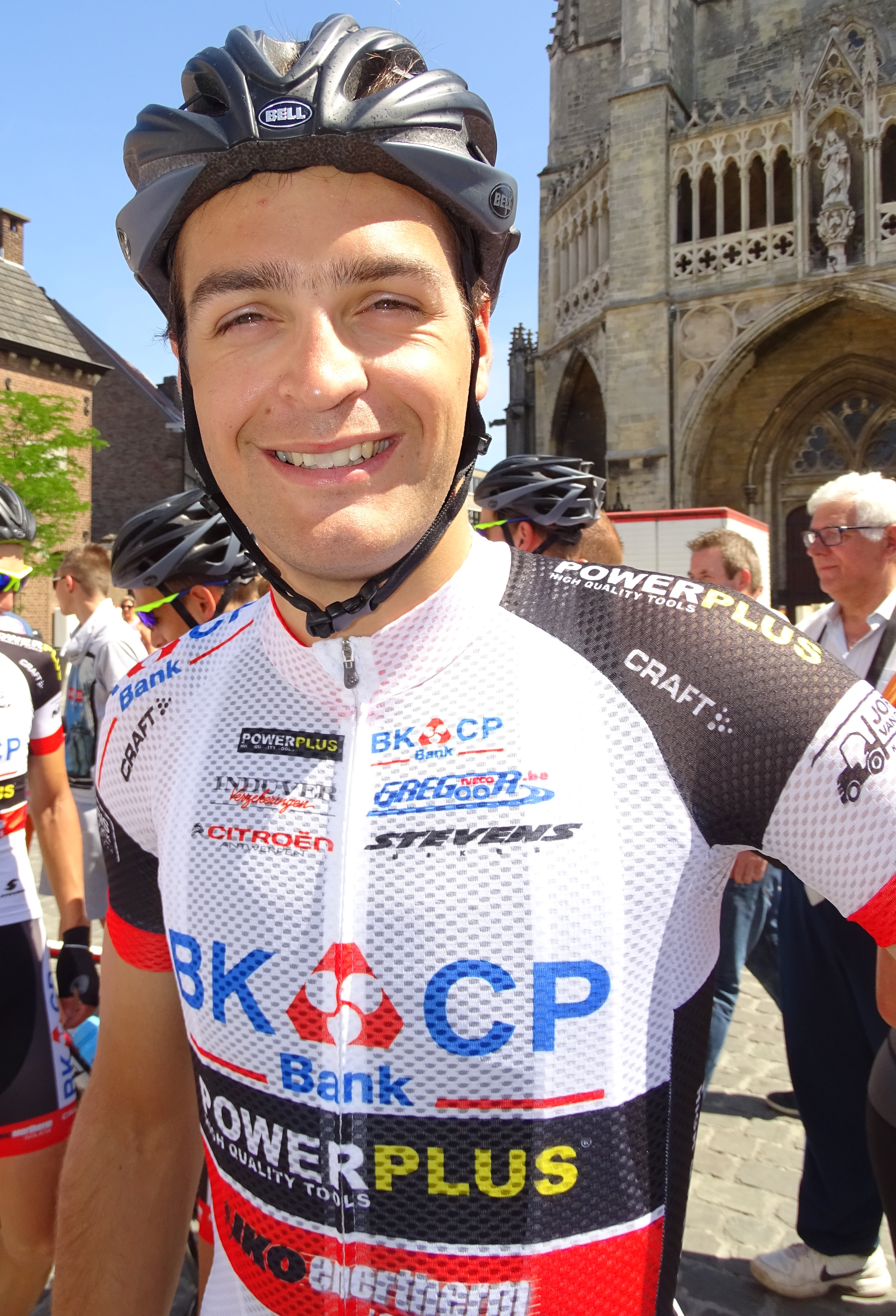 Reportage réalisé le dimanche 14 juin à l'occasion du départ et de l'arrivée du Tour du Limbourg 2015 à Tongres, Belgique.